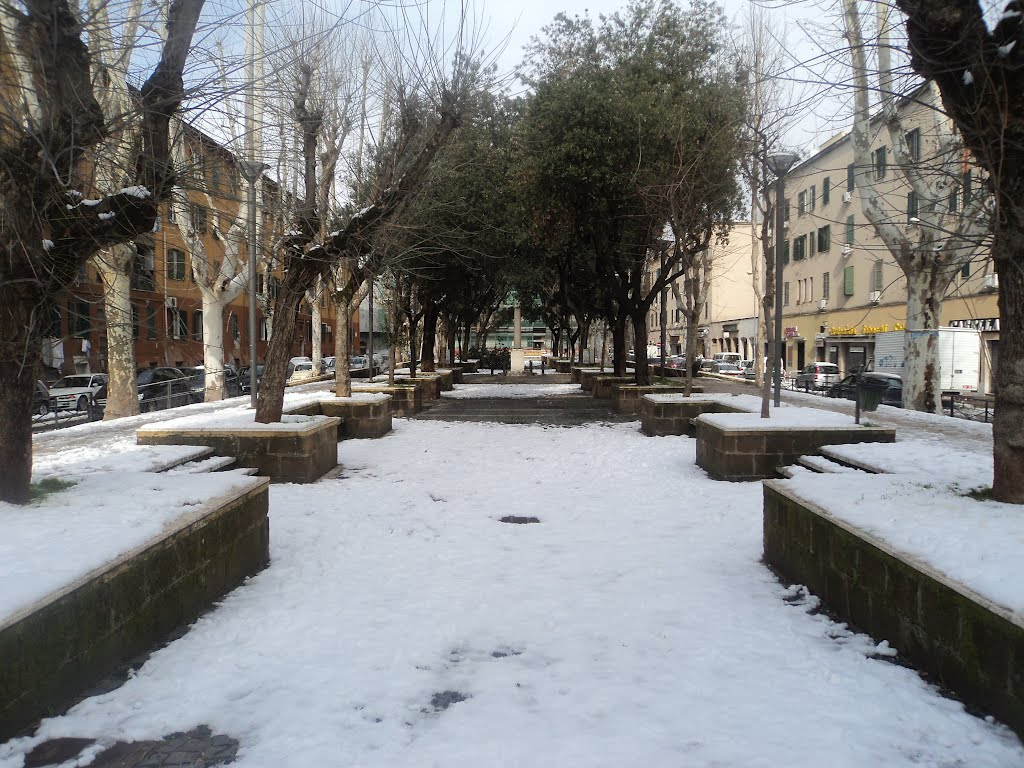 Piazza del Quarticciolo dopo la neve nel febbraio 2012. Per altre foto